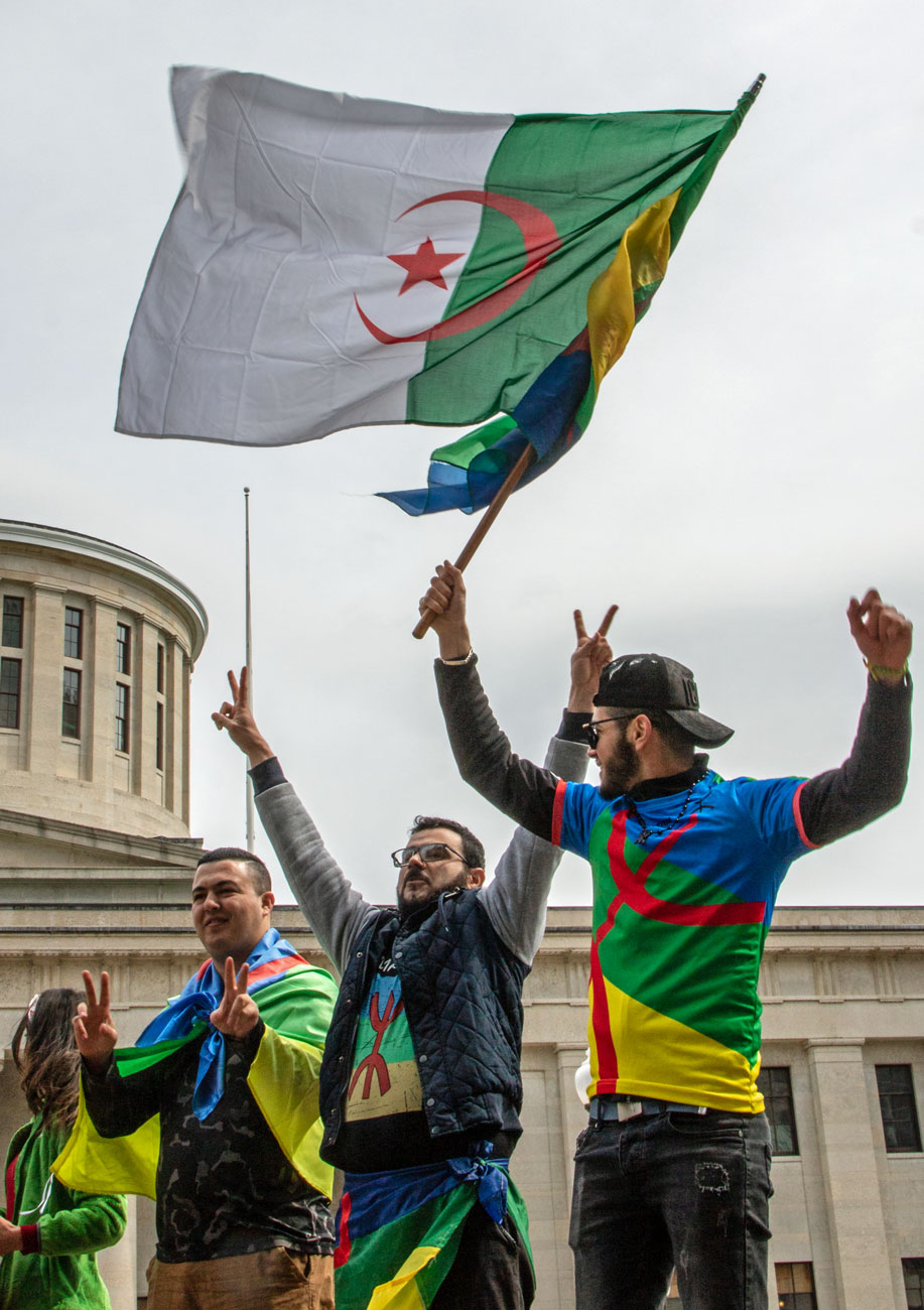 IMG_2000 (2)